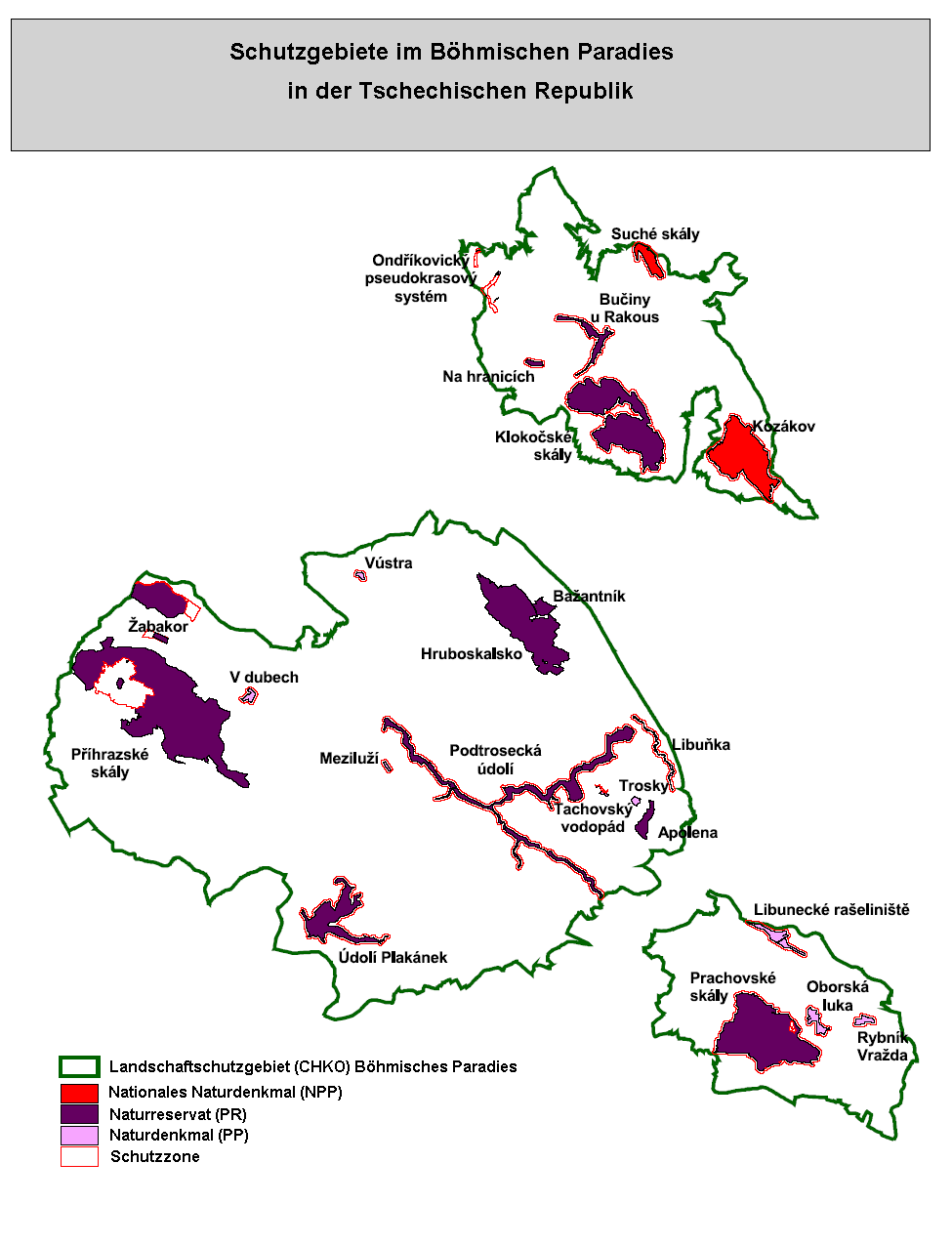 Karte Landschaftsschutzgebiet Böhmisches_Paradies